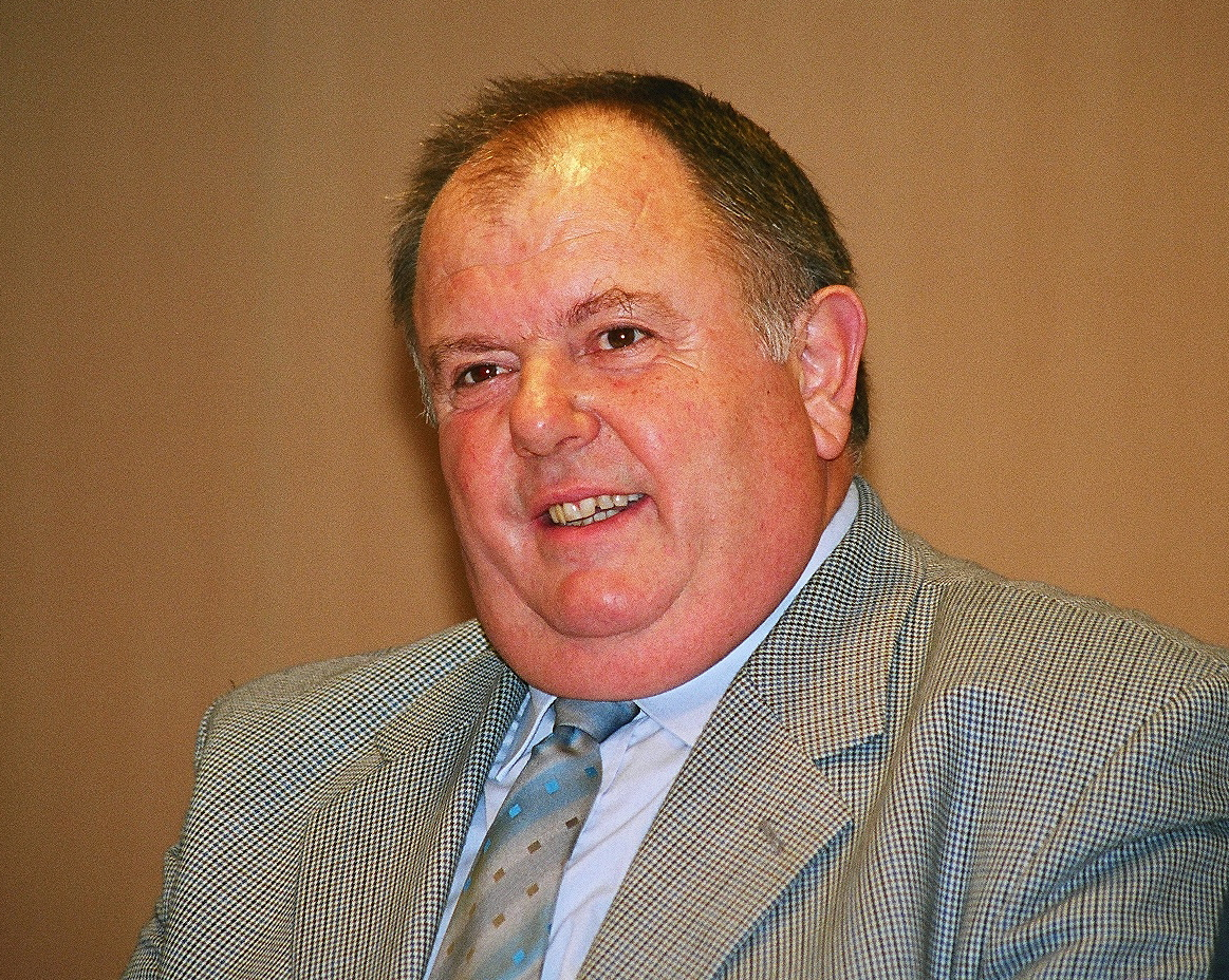 Gérard Aubry, maire de Saincaize-Meauce, vice-président de la communauté d'agglomération de Nevers, cliché libre de droit publiable moyennant mention du crédit de la Ville de Nevers